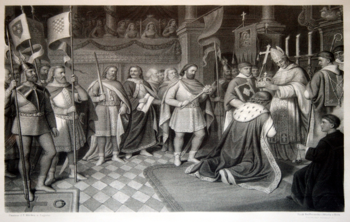 Krunidba kralja Zvonimira, J.F. Mücke, Reiffenstein & Röch, Zagreb; Beč, 1868. godine, snimljeno tijekom Noći muzeja